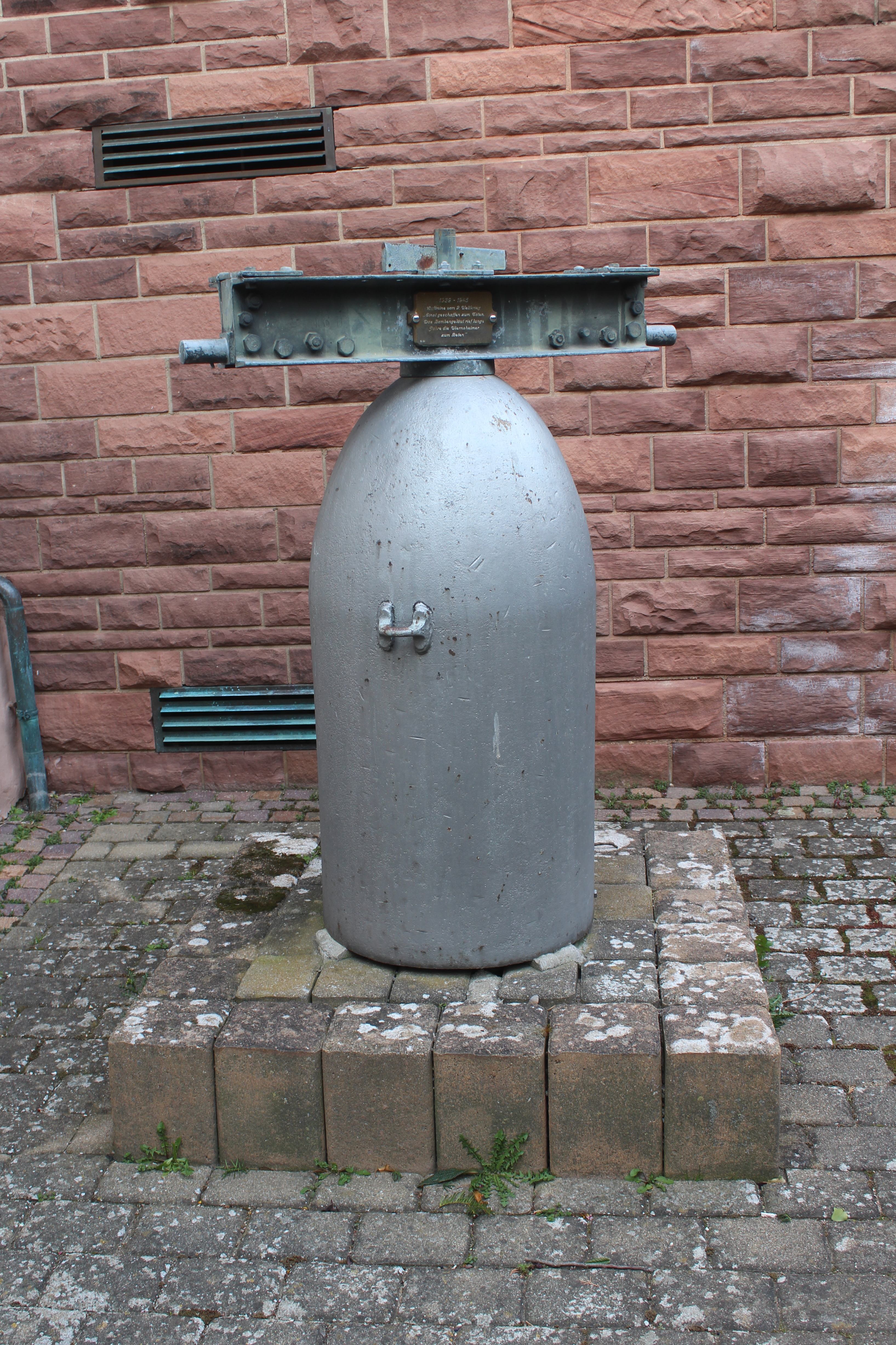 Aus einer Luftmine gefertigte, einstige Kirchenglocke der Kirche Sankt Mauritius in Wiernsheim